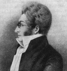 Retrato del Peter Wilhelm Lund (1801 – 1880) zoologo y paleontólogo danes.